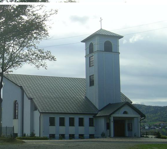 Kościół parafii MB Pocieszenia w Świnnej Porębie